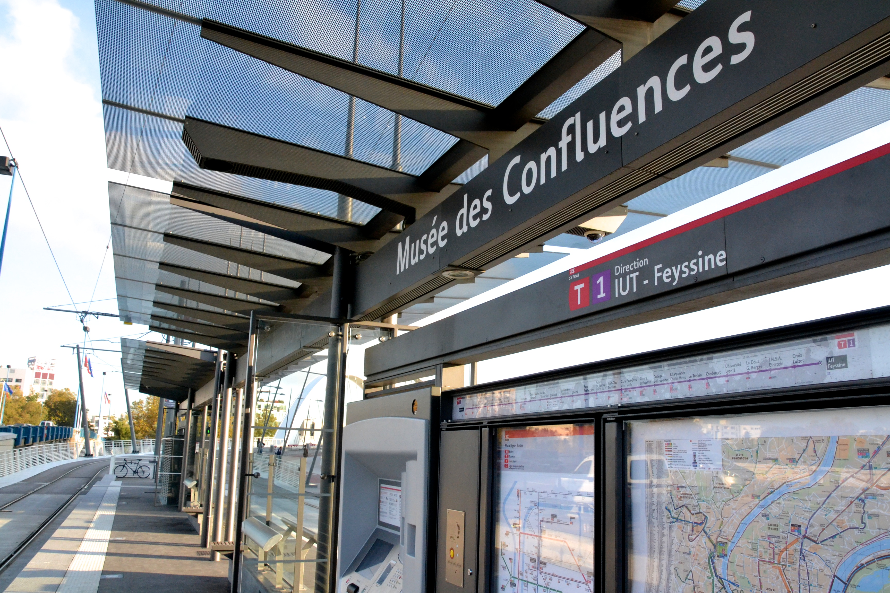 Station de tramway Musée des confluences (Lyon, Rhône, France).